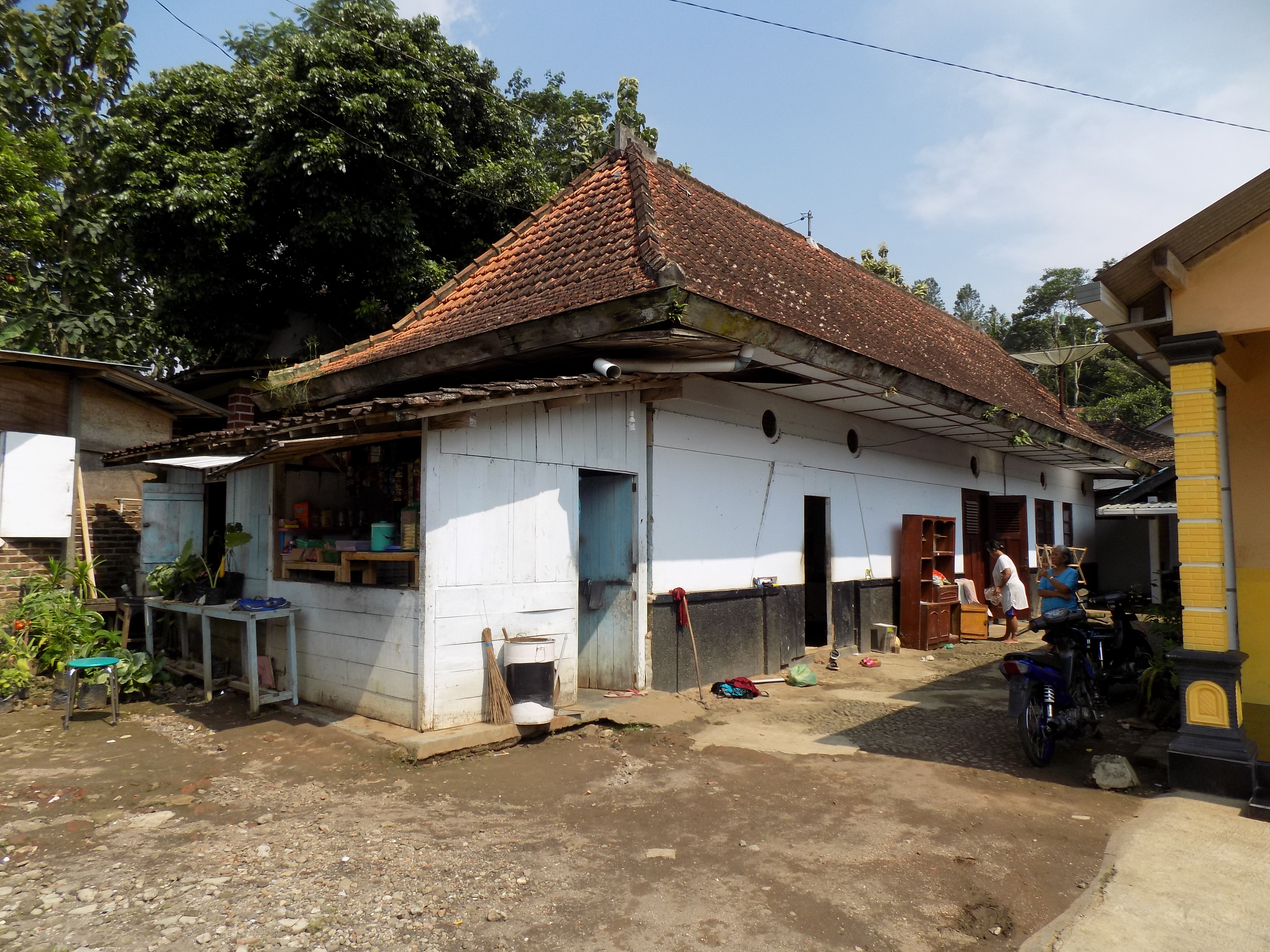 Stasiun Kranggan